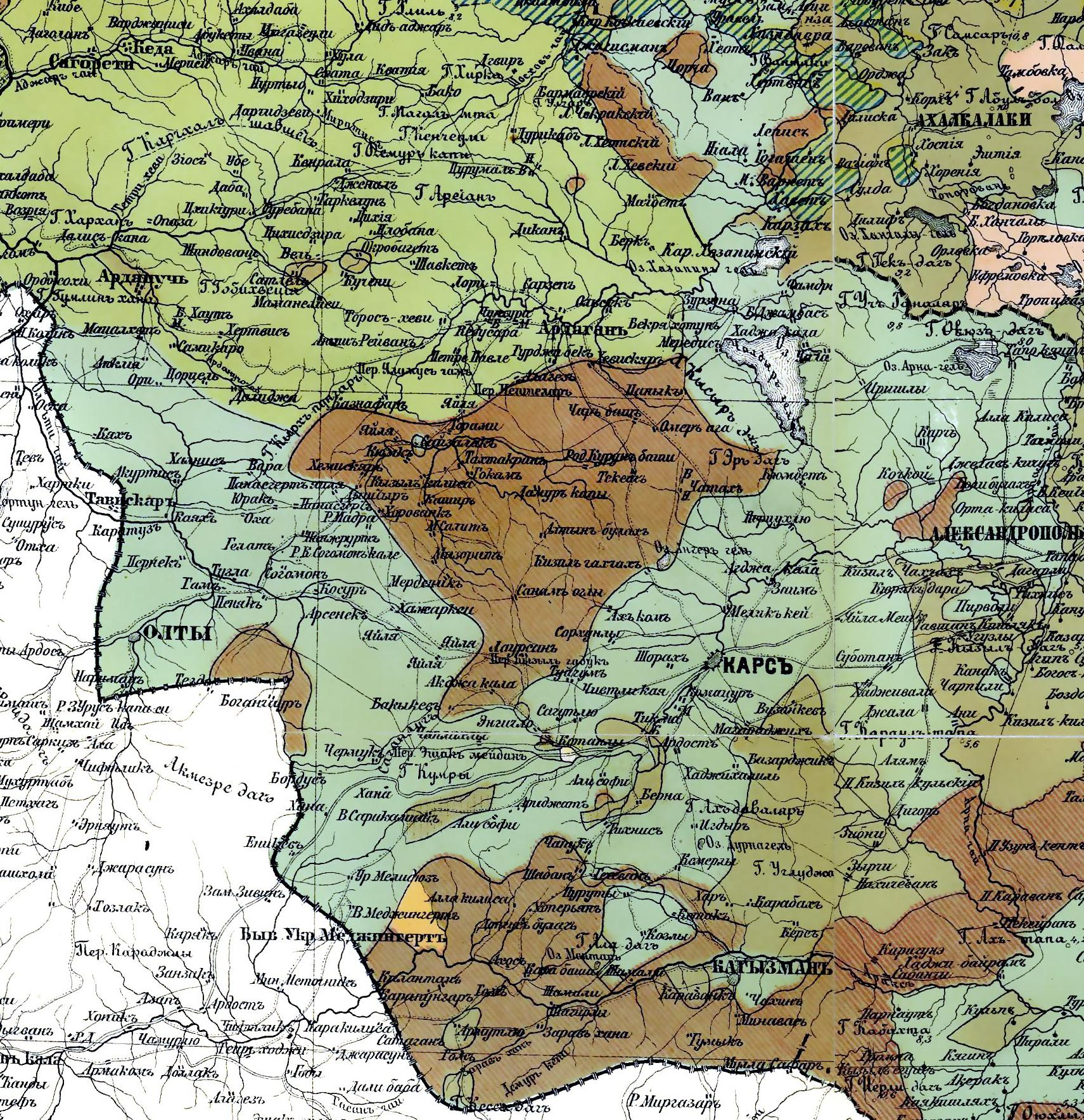 Этнографическая карта Карсской области, 1880 г. (Масштаб: 1:1080000).